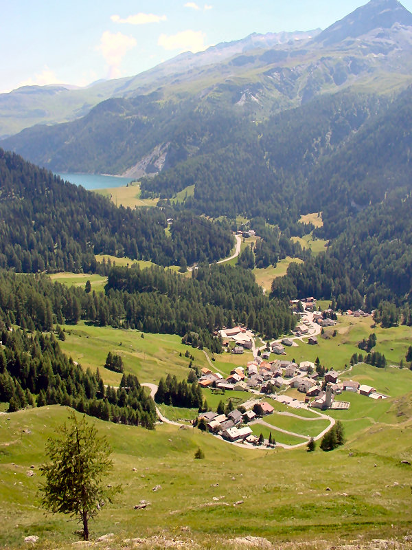 Gemeinde Sur GR, im Hintergrund der Lai di Marmorera